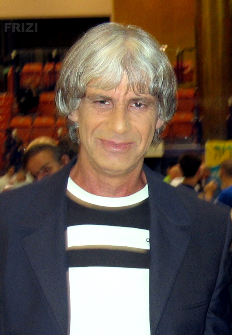 מאיר איינשטין התמונה צולמה באולם הכדורסל, היכל הספורט עין- שרה בעיר נהריה .